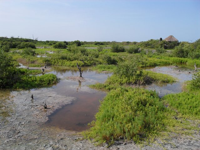 palude della riserva di celestun